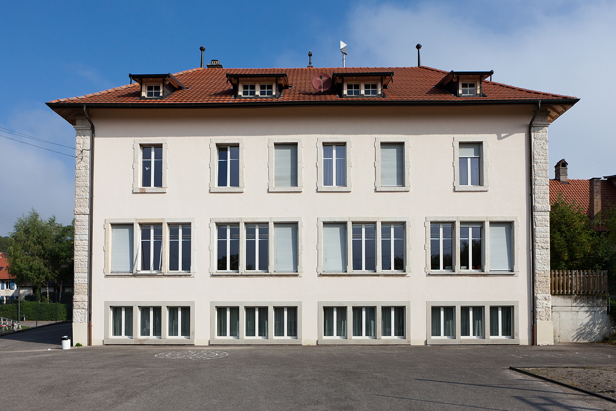 L'école à Réclère (Haute-Ajoie, JU)